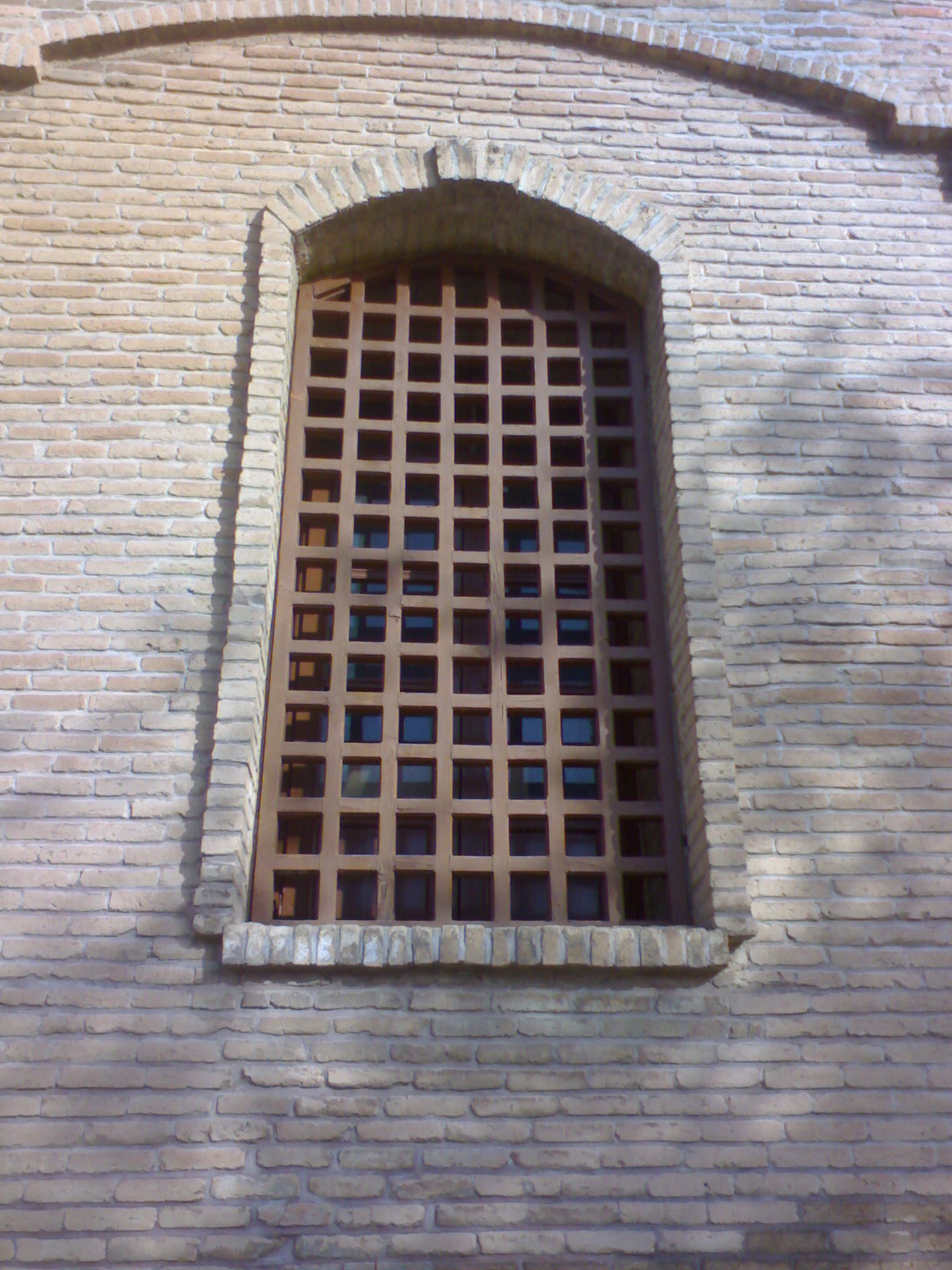 پنجره های داخلی قلعه فلک الافلاک